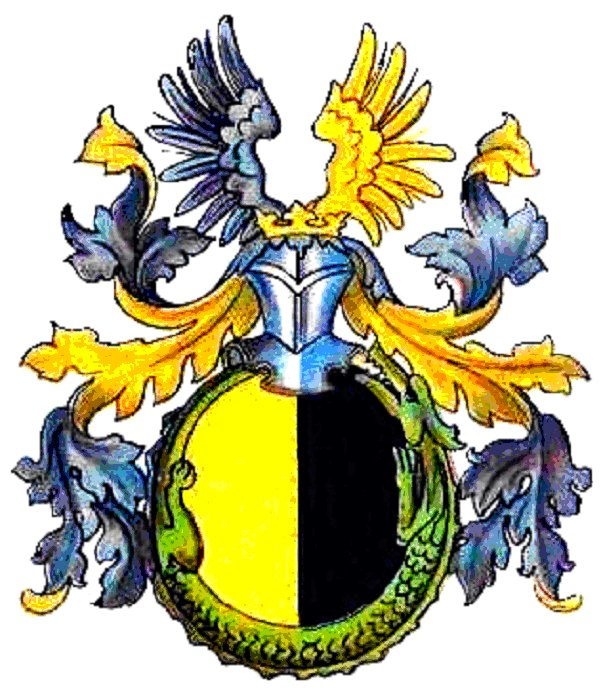 Wappen der Grafen von Wartenberg 1699